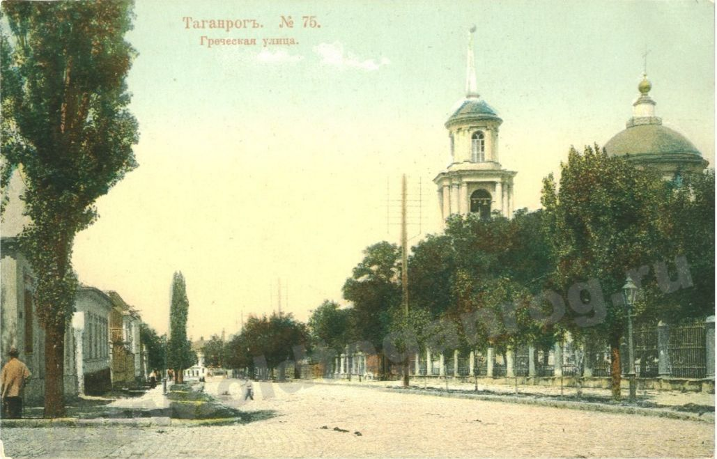 Греческая улица, Таганрог Ростовская область РФ